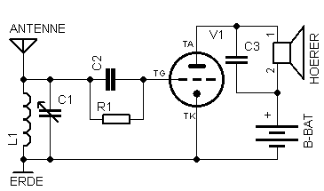 Gitterkombinationaudion